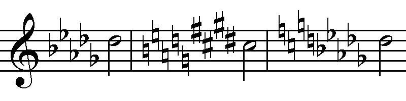 zenei módosítójelek - előjegyzésváltás 3.